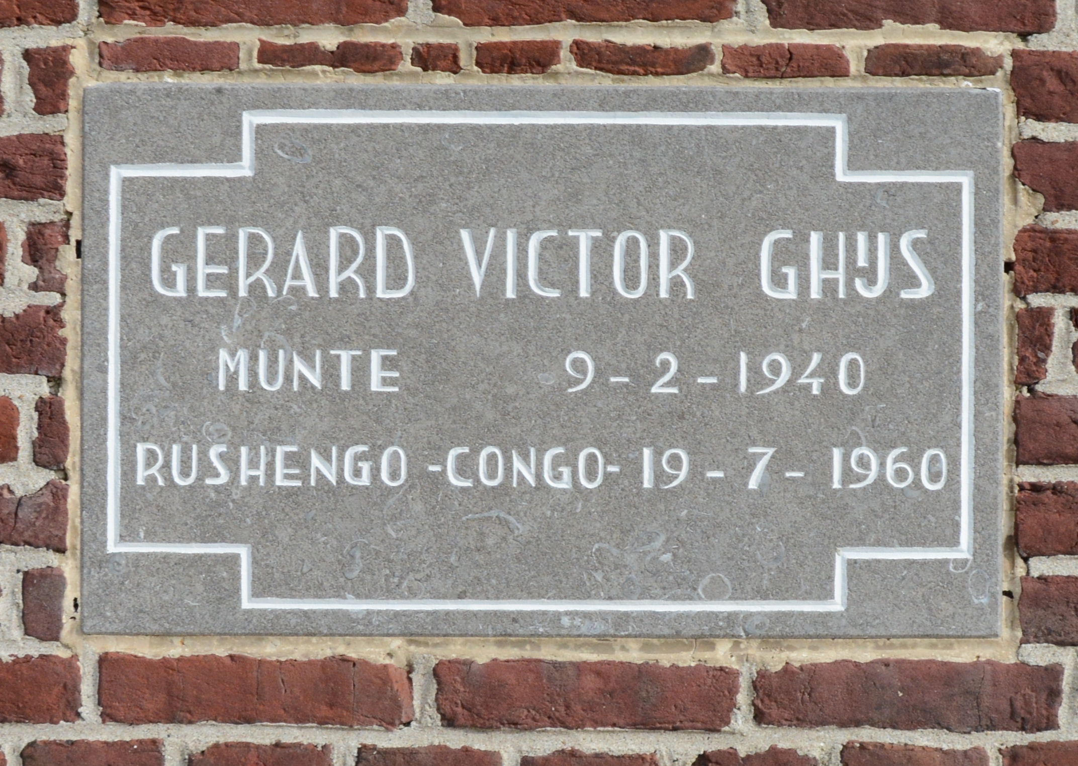 G.V. Ghijs memorial in gevel kerk Munte